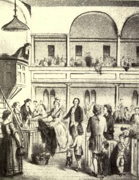 Vol. 3